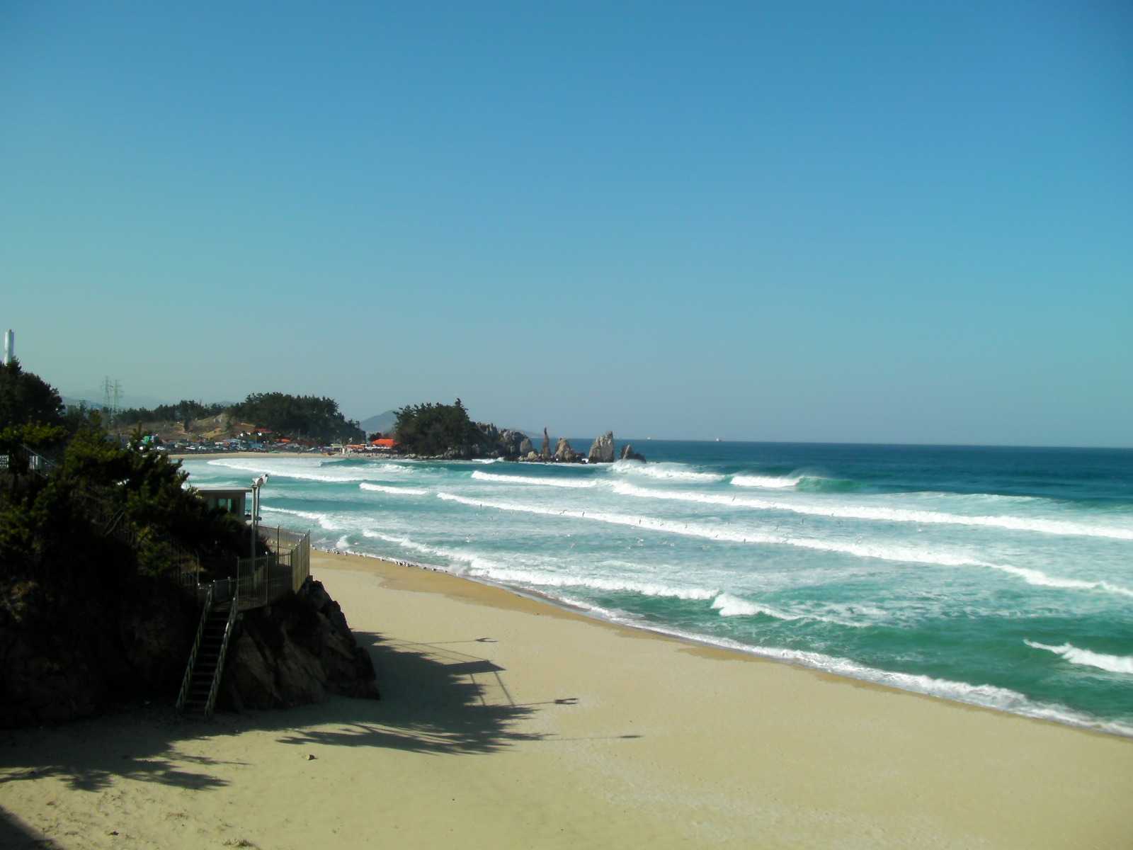 Samcheok Beach, Galcheon-dong, Samcheok City